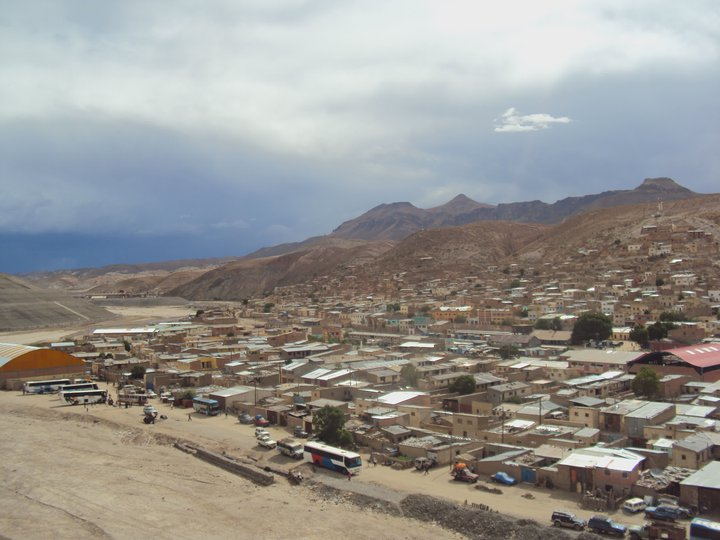 Vista panoramica de Atocha